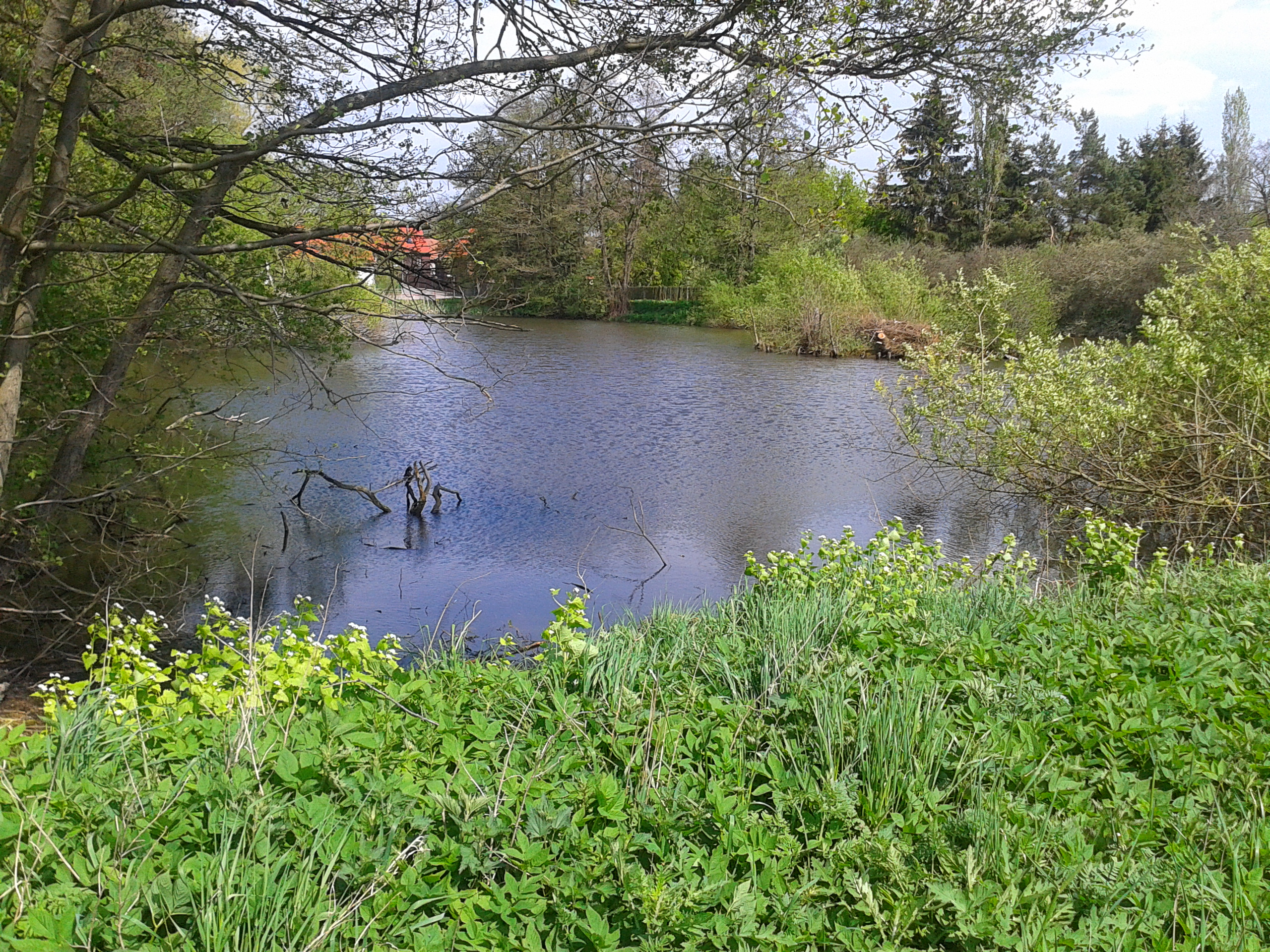 Blick über den Neudorfer Gemeindeteich